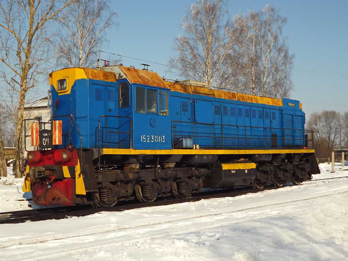 С завода поступил в депо Брянск-II В 2006 г. передан в депо Калининград В 2010 г. передан в депо Дно 01.2013 г. передан в депо Бологовское На 04.2016 г. — база запаса Бологое-Полоцкое